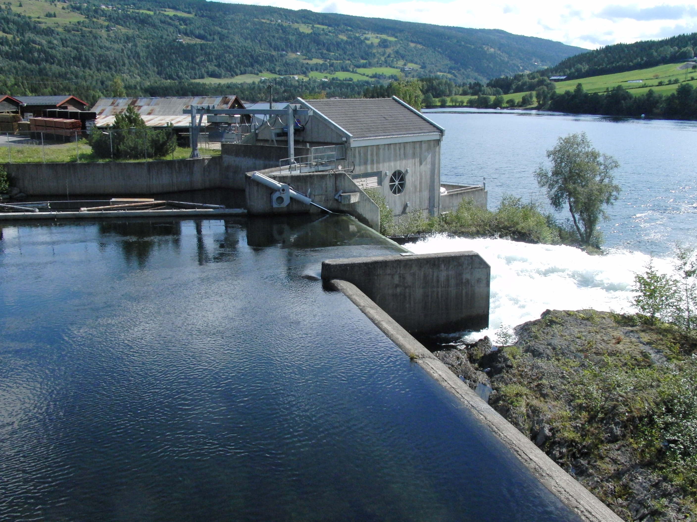 Fossheimfoss kraftverk